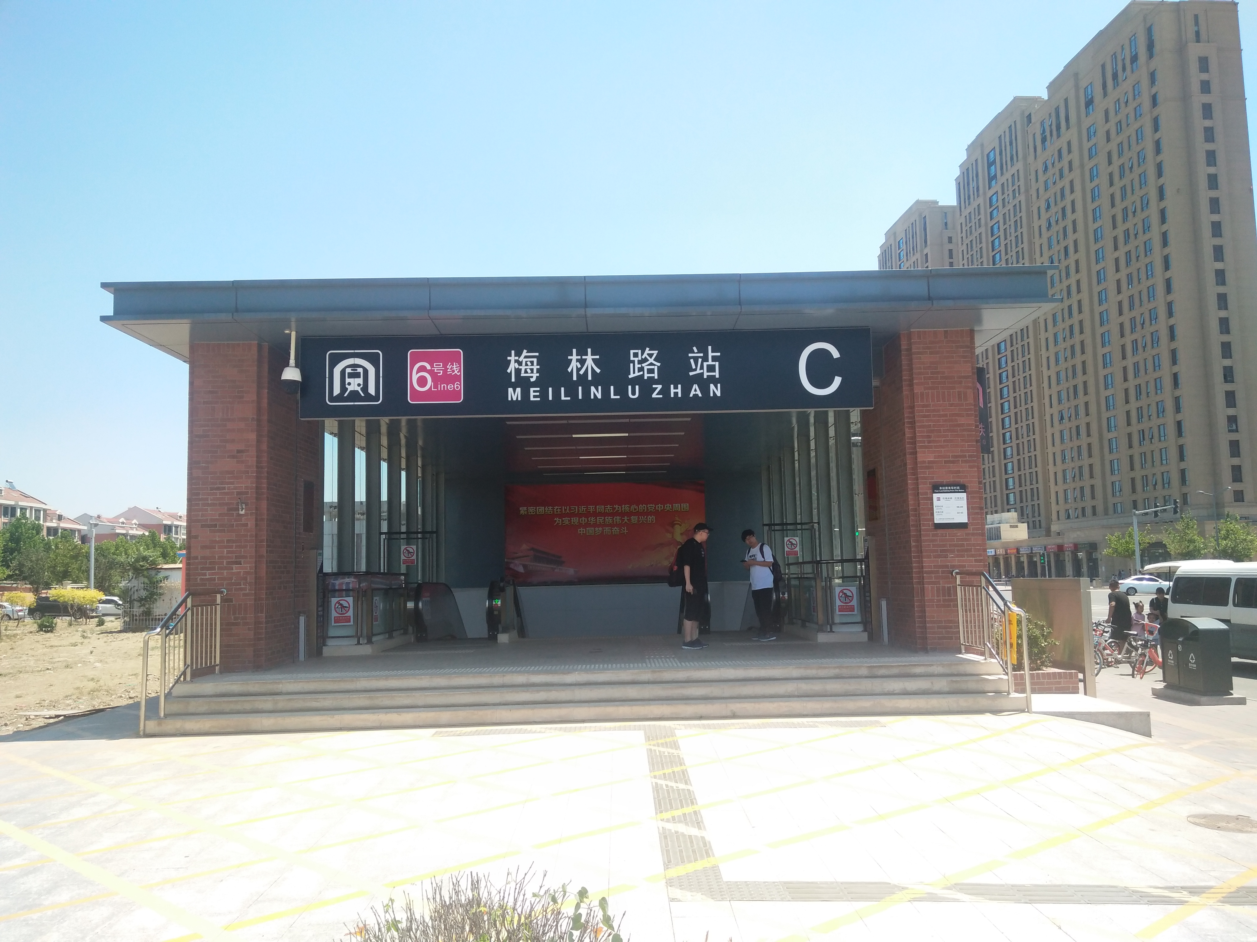 天津地铁6号线梅林路站C口